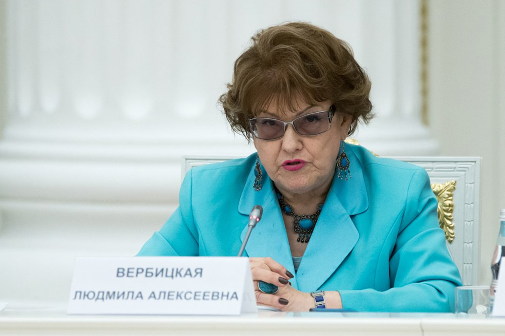 Людмила Алексеевна Вербицкая (1936—2019) — российский лингвист